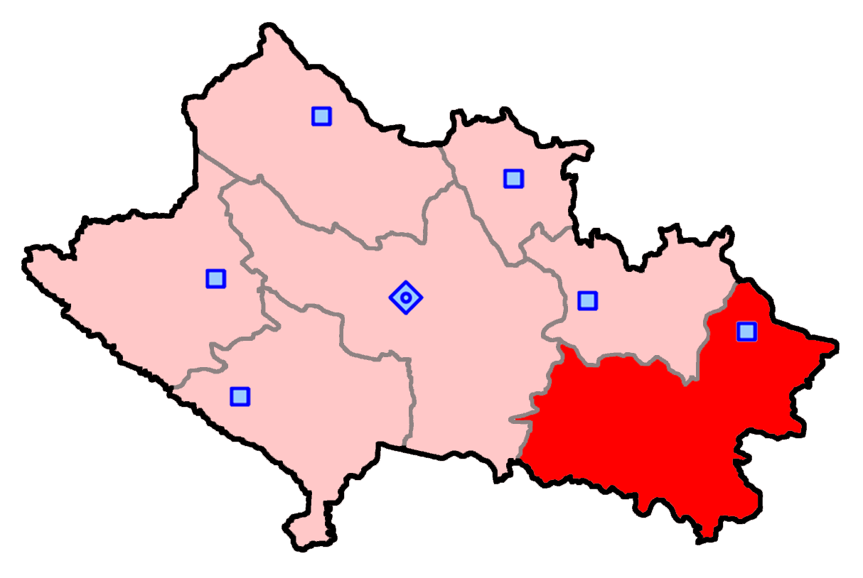 حوزه الیگودرز برای انتخابات مجلس شورای اسلامی